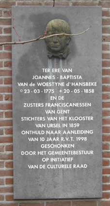 Monument aan Rusthuis Onderdale - Onderdale - Ursel - Knesselare - Oost-Vlaanderen - Vlaanderen - Ursel